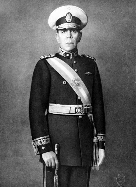 Retrato oficial de Edelmiro Farrel, presidente de facto.